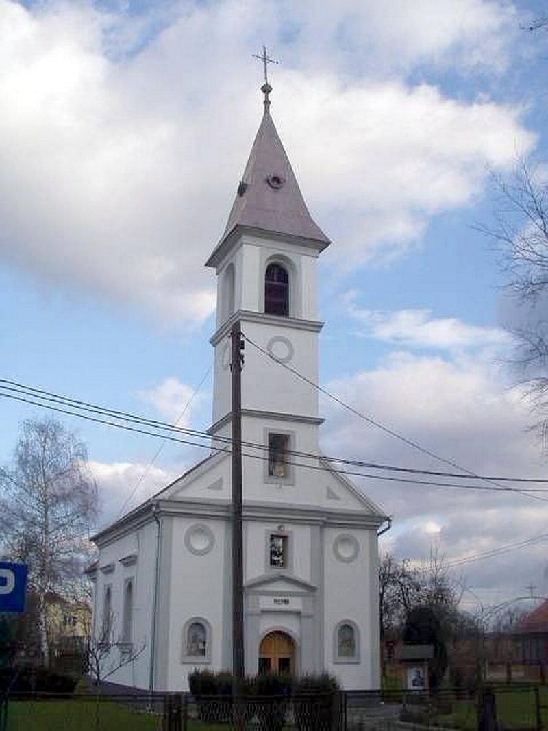 Farkaševac - Chapel